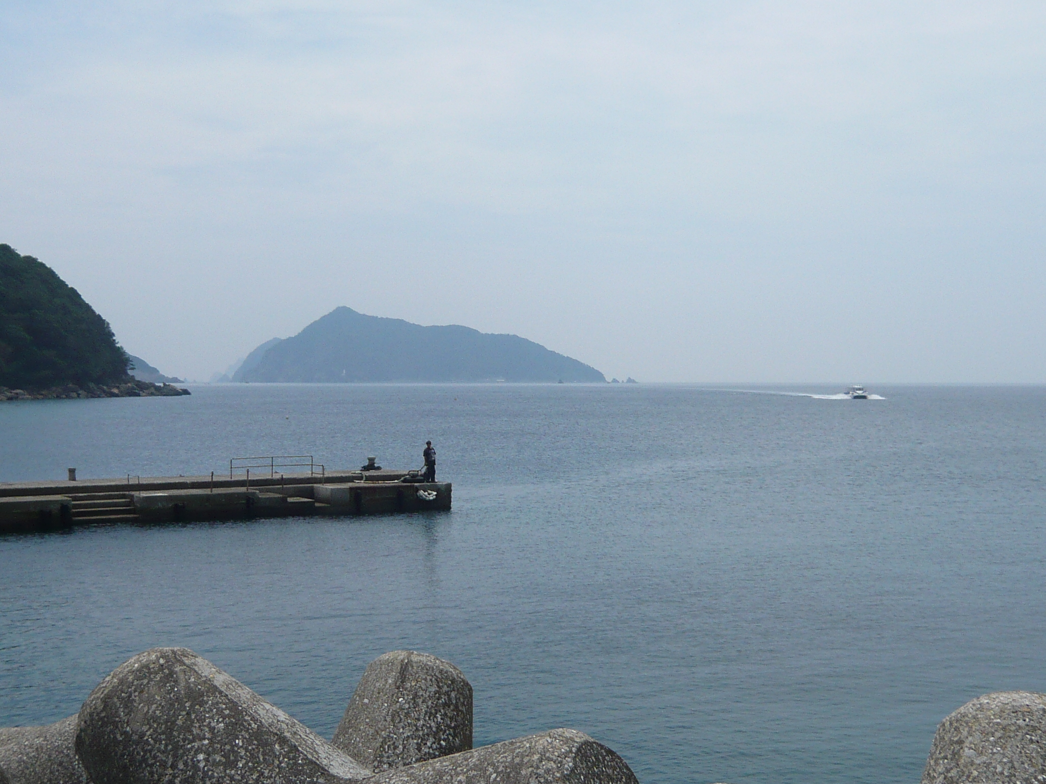 鹿島（愛南町西海地区）